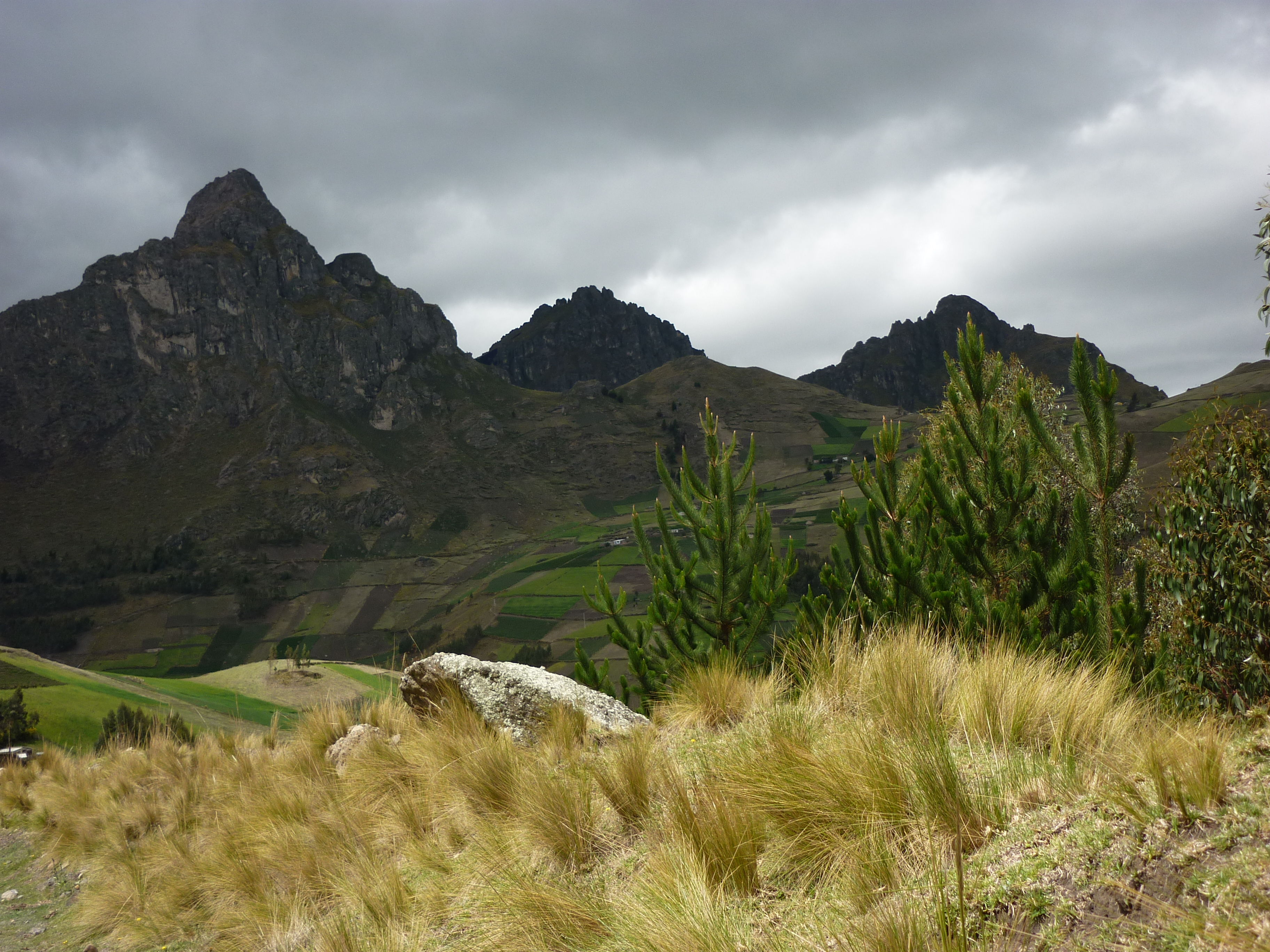 MONTAÑAS_DE_ZUMBAHUA Ecuador